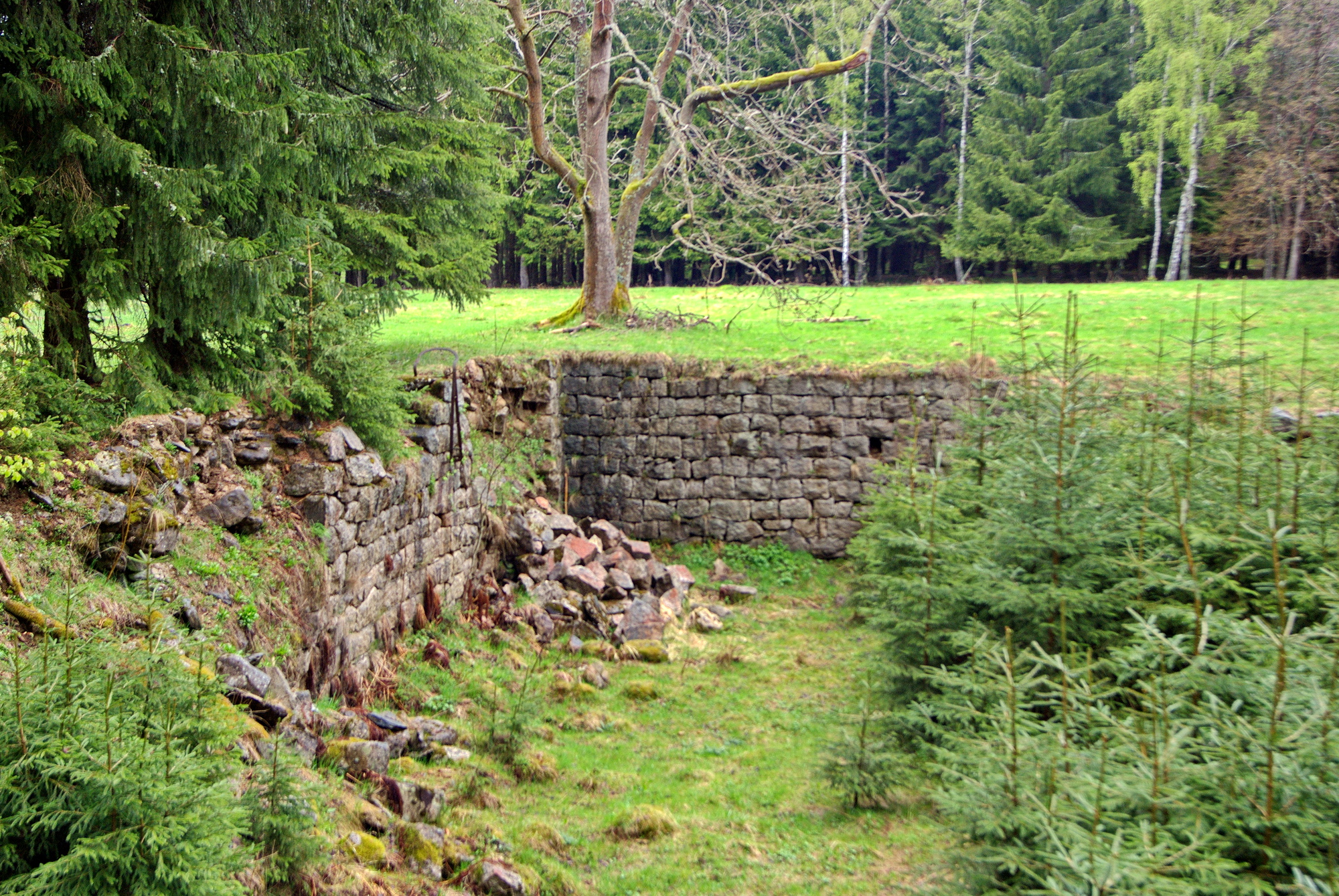 Pila (Brettmühl), zaniklá osada u říčky Černá, pozůstatky bývalého koupaliště napájeného říčkou Černá, Krušné hory, okres Karlovy Vary